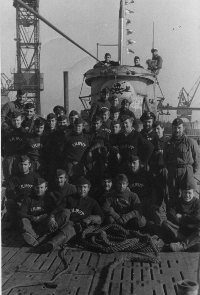 Besatzung U 575 nach Rückkehr von der 7. Feindfahrt 1943 in St. Nazaire